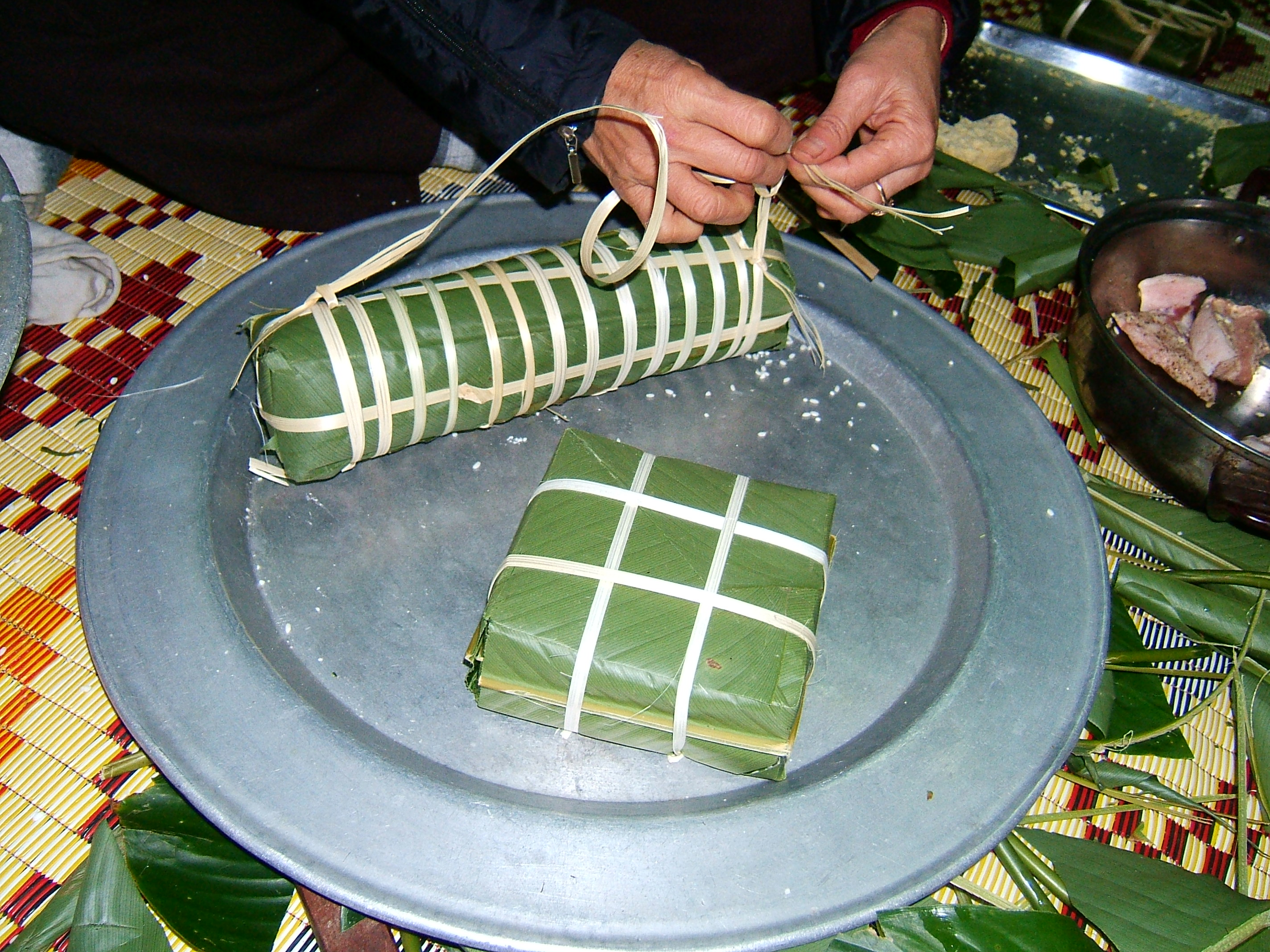 Bánh tày, a variation of Bánh chưng